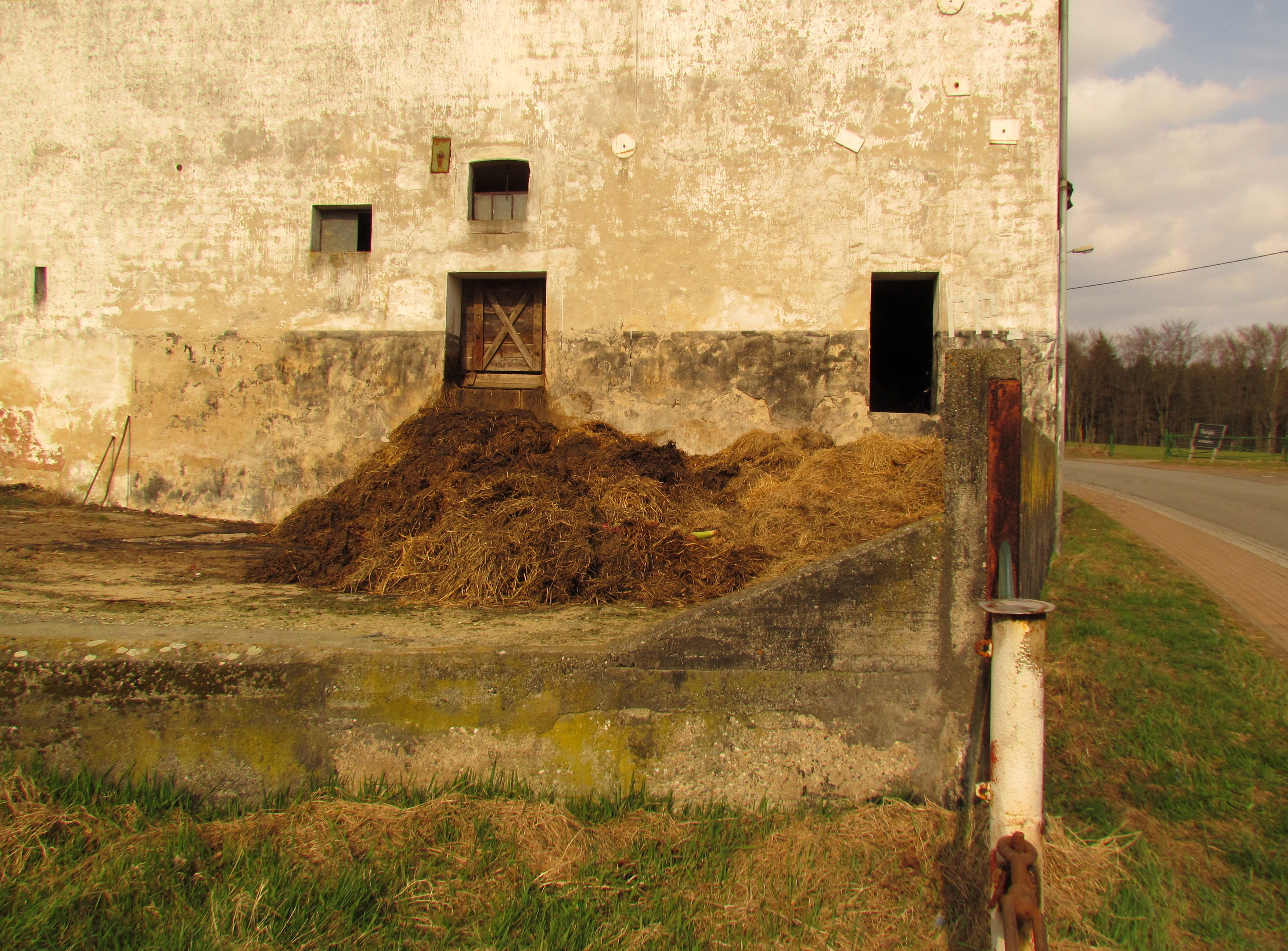 Bildinhalt: Misthaufen im Eschweilerhof Aufnahmeort: Eschweilerhof, Deutschland